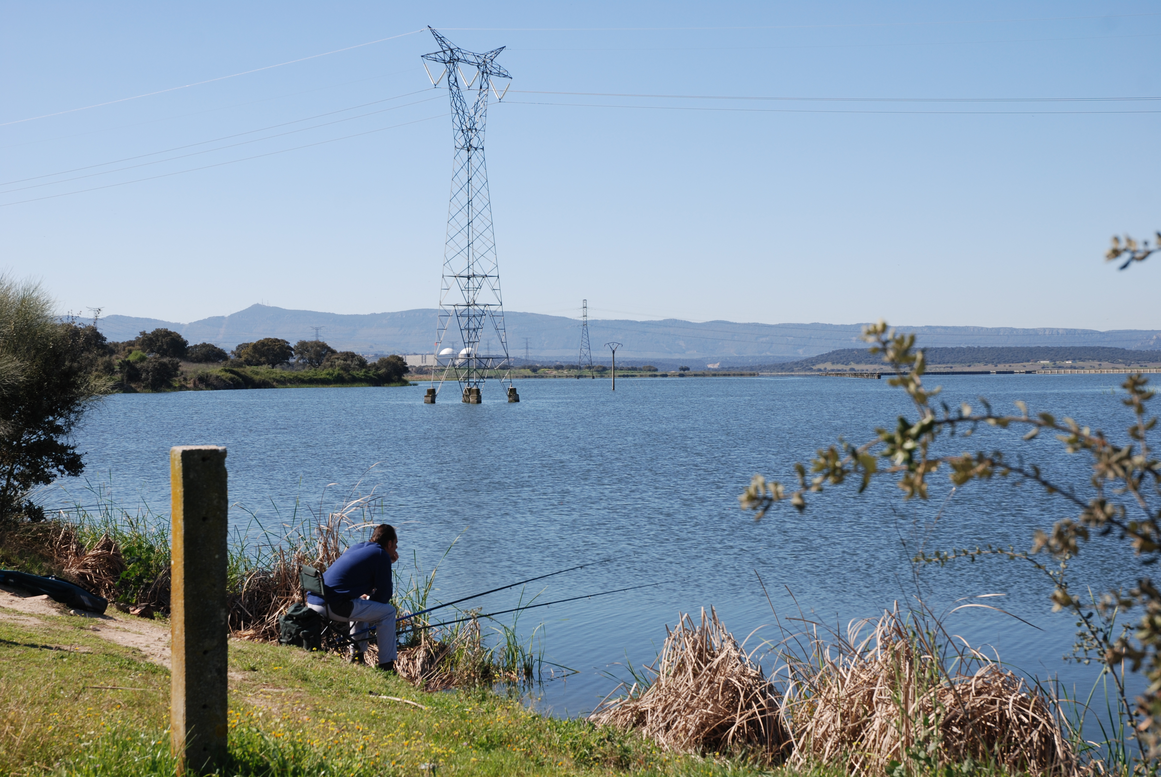 Embalse de Arrocampo en Saucedilla (prov. de Cáceres)